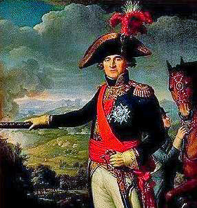 Portrait du Maréchal d'Empire Jean Mathieu Philibert Sérurier